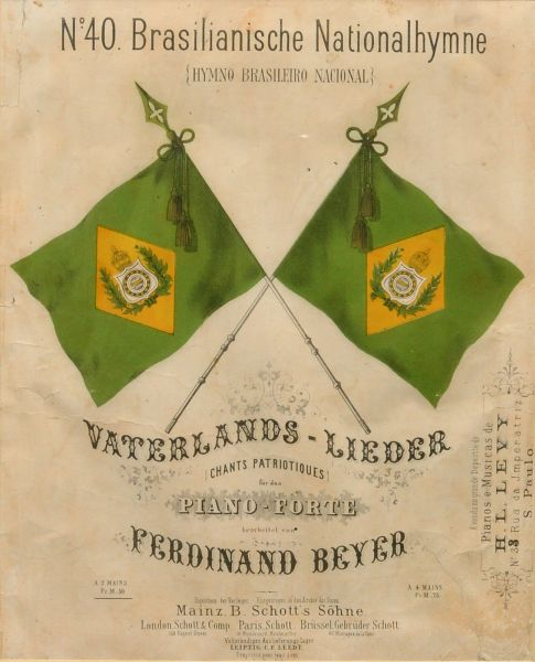 Hino Nacional do Império do Brasil em partitura de piano de Ferdinand Beyer.